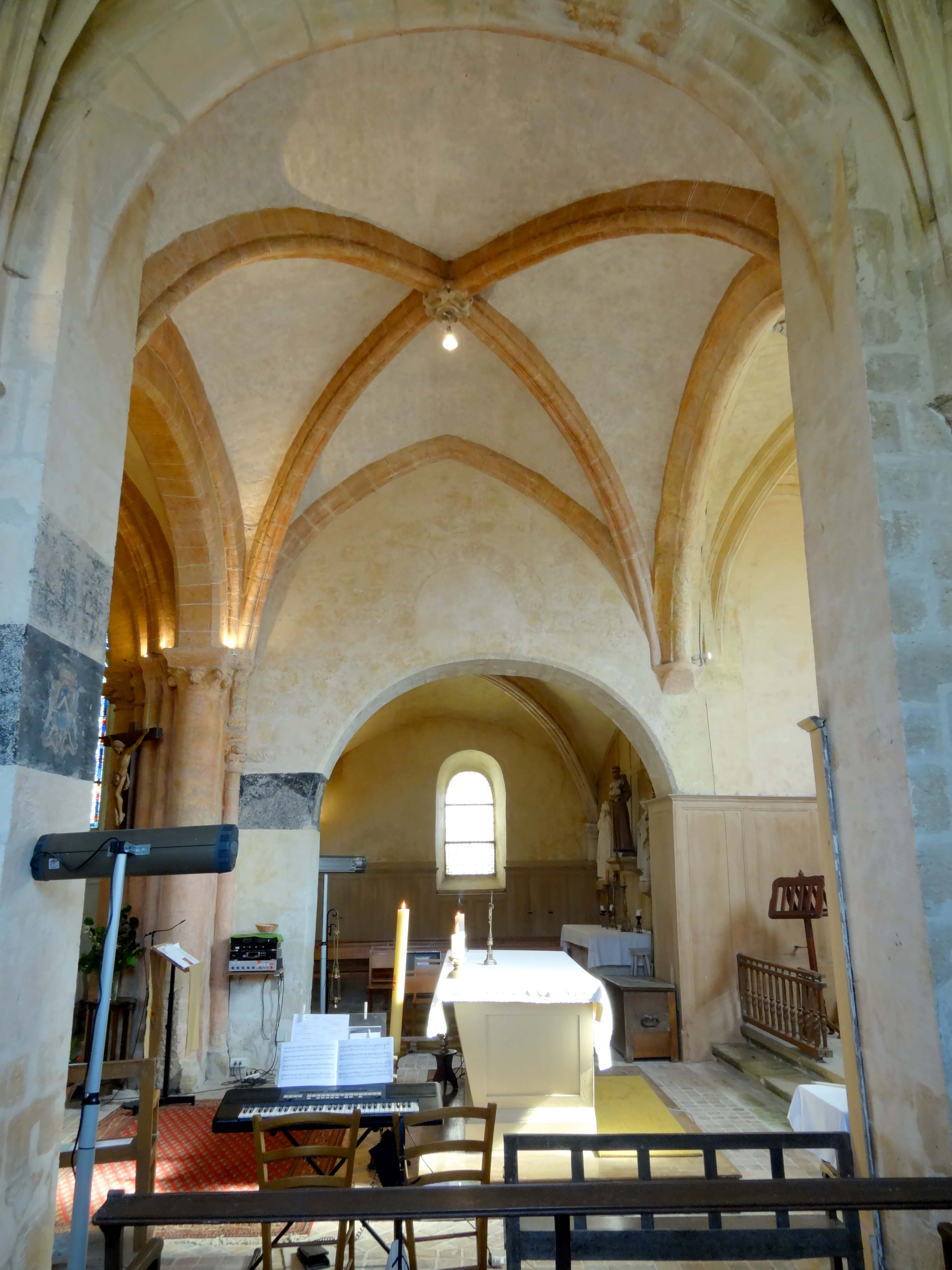 Intérieur de l'église - voir titre.